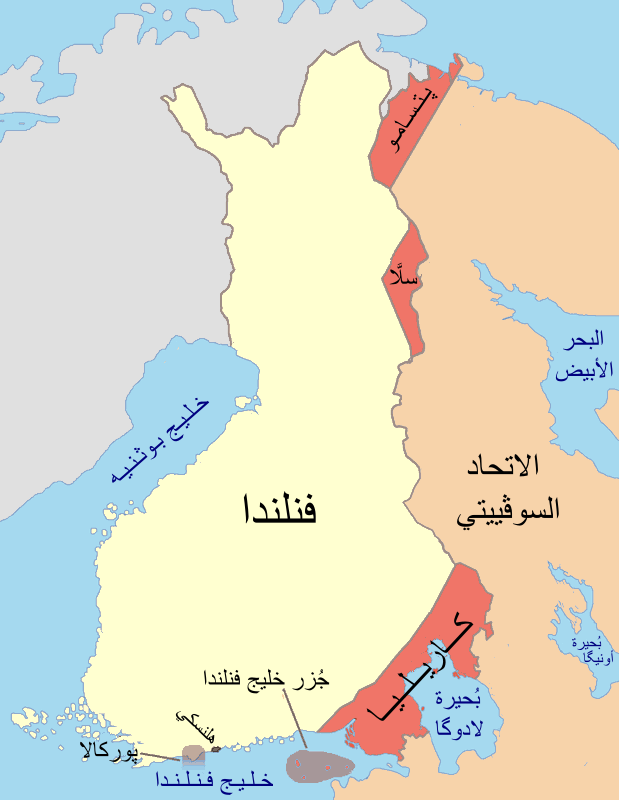 خارطة تُظهر المناطق الفنلنديَّة التي ضُمَّت إلى الاتحاد السوڤييتي سنة 1944م، بعد انتهاء حرب الاستمرار.